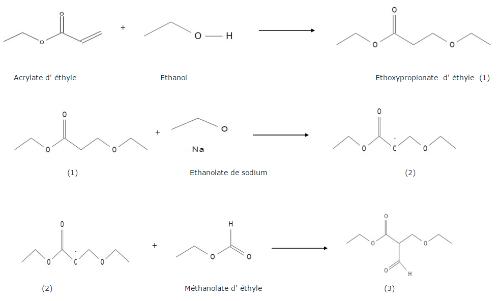 Synthèse de l'étape 1 jusqu'à la 3